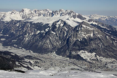 Blick von Laufböden hinunter nach Mels und Sargans